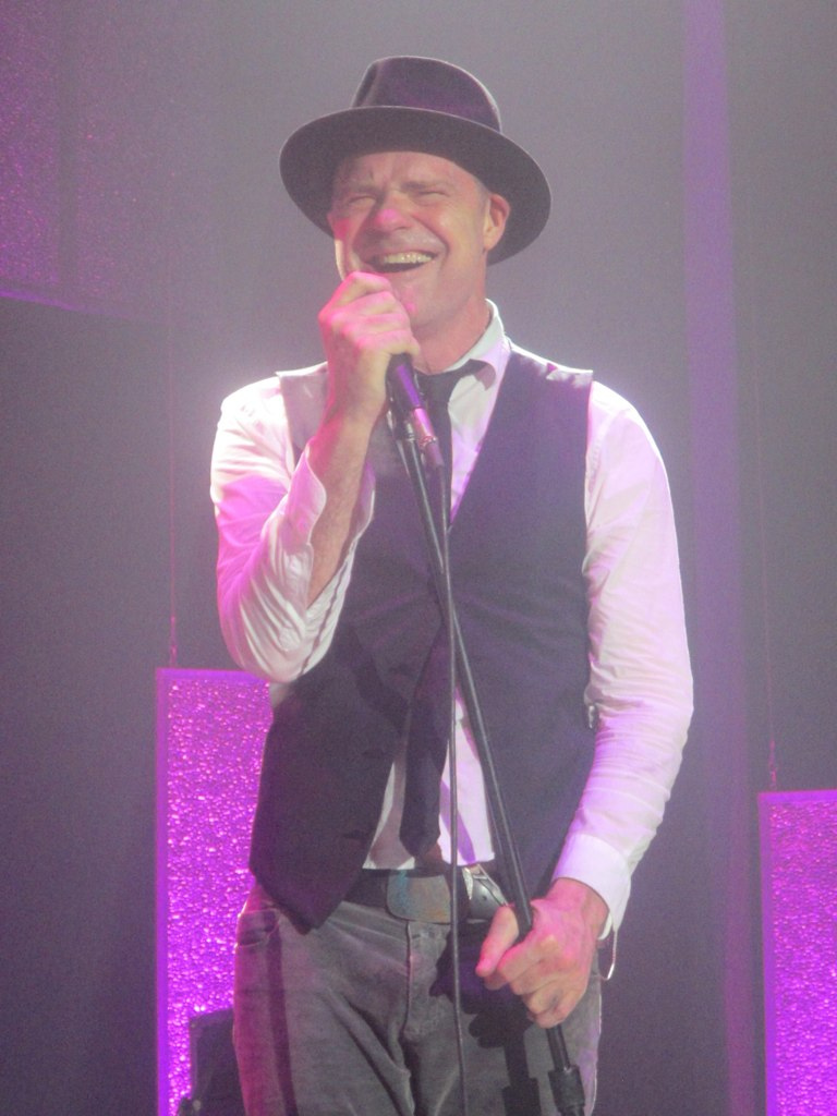 Gord Downie performing in 2013